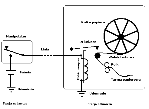 PAKO